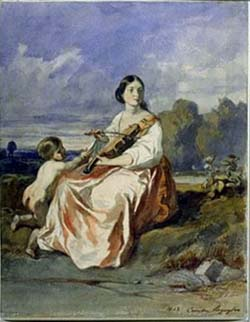 Euterpe pintura de Camille Roqueplan (1803-1855)